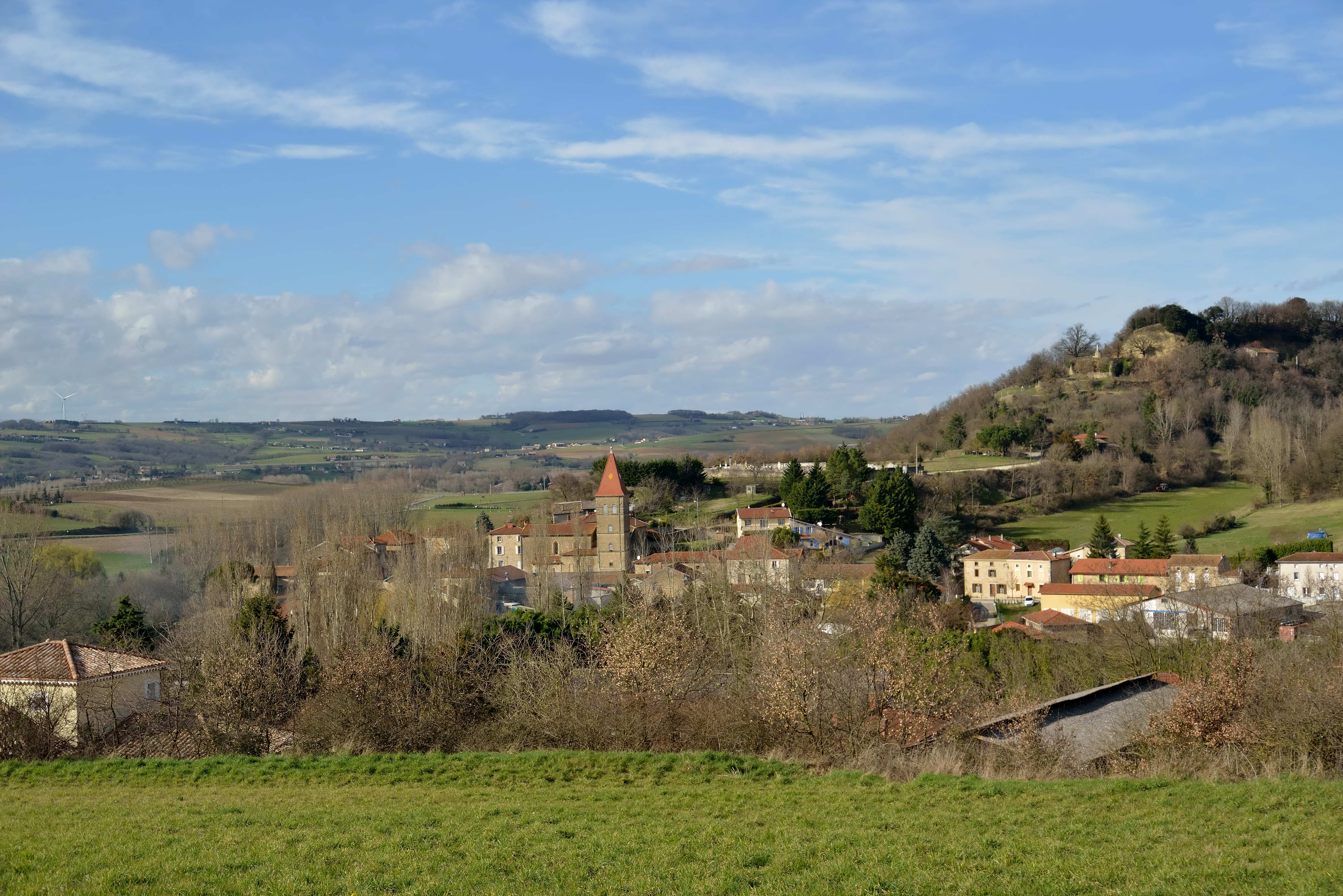 claveyson